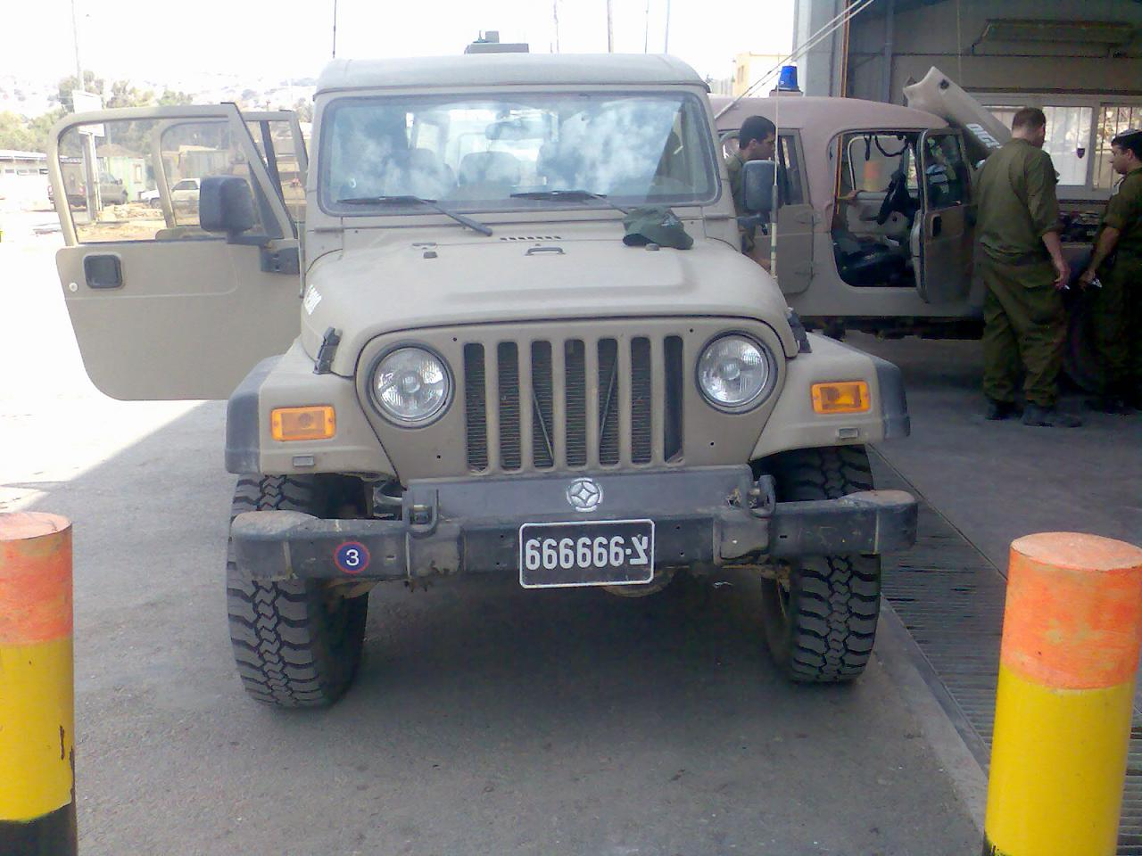 Sufa 2 army jeep